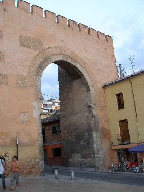 Moorish door of Elvira, in Granada, Spain. 11th century Puerta de Elvira, de origen árabe, siglo XI. Granada, España.